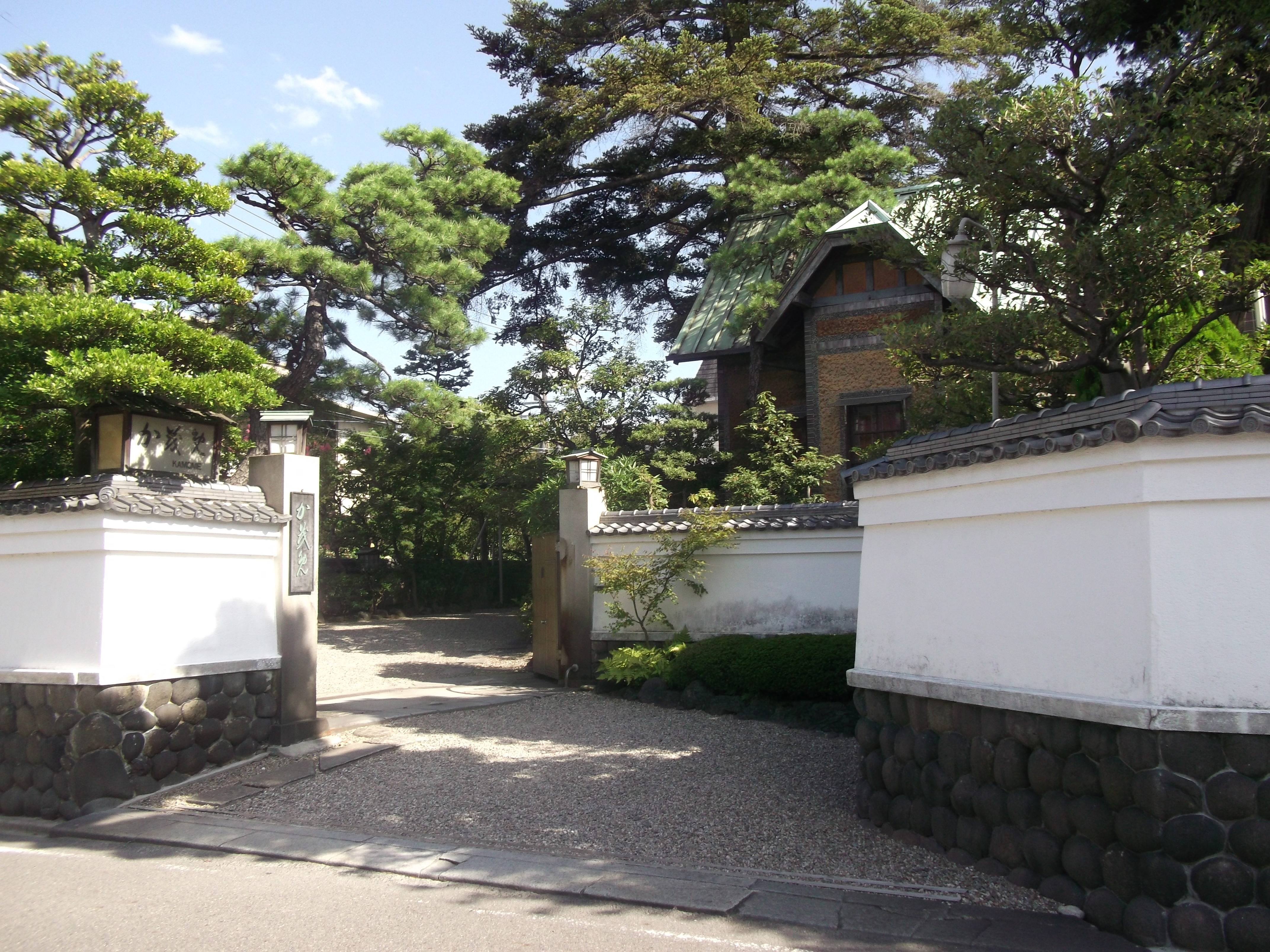 名古屋市東区白壁の料亭か茂免本店を北側公道より撮影